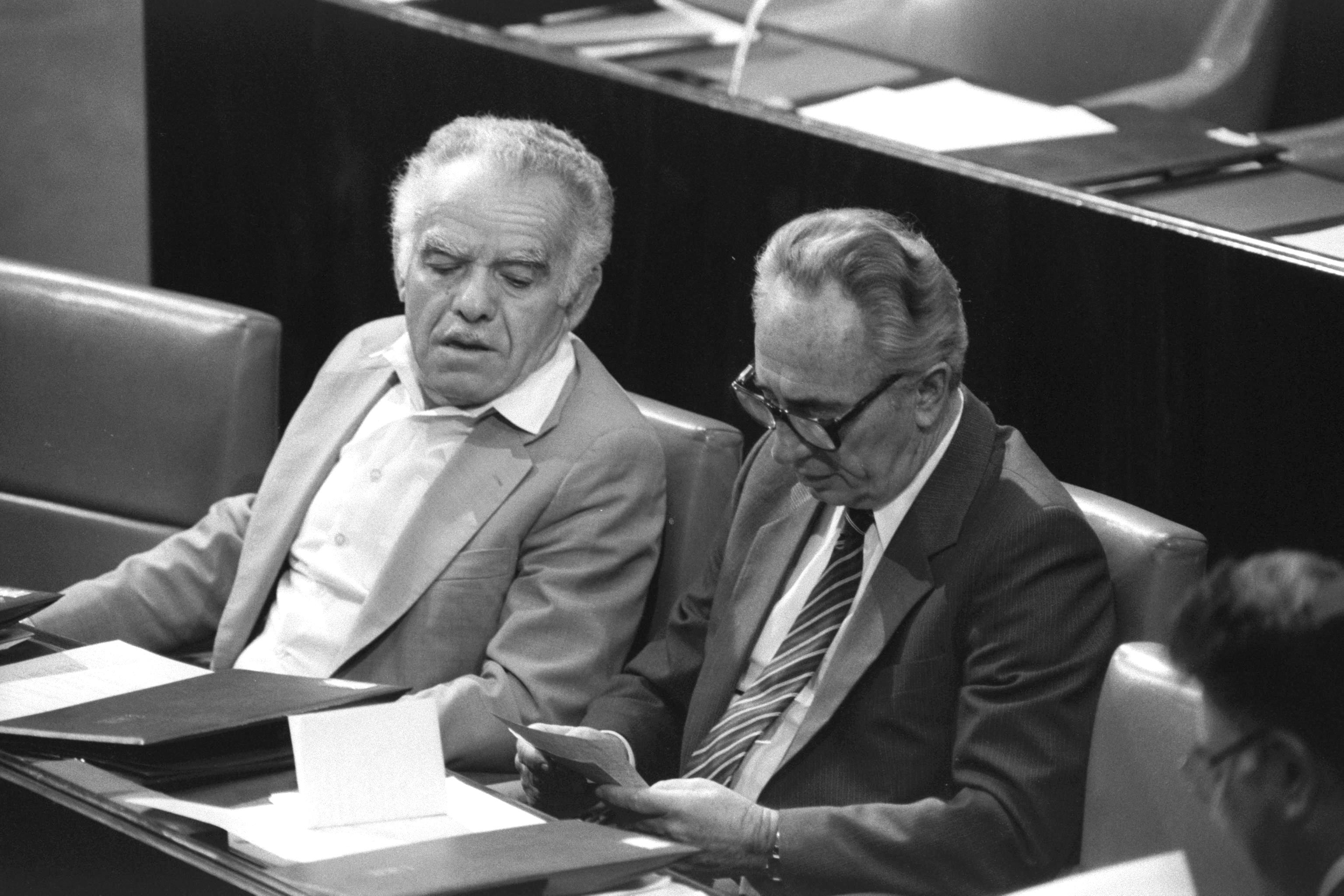 Vice Premier Yitzhak Shamir peeps over the shoulder of Prime Minister Shimon Peres in the Knesset. סגן ראש הממשלה יצחק שמיר מציץ במסמכיו של ראש הממשלה שמעון פרס (מימין), במליאת הכנסת בירושלים.